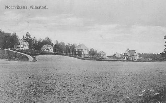 Gamla bilder från Norrvikens Villastad